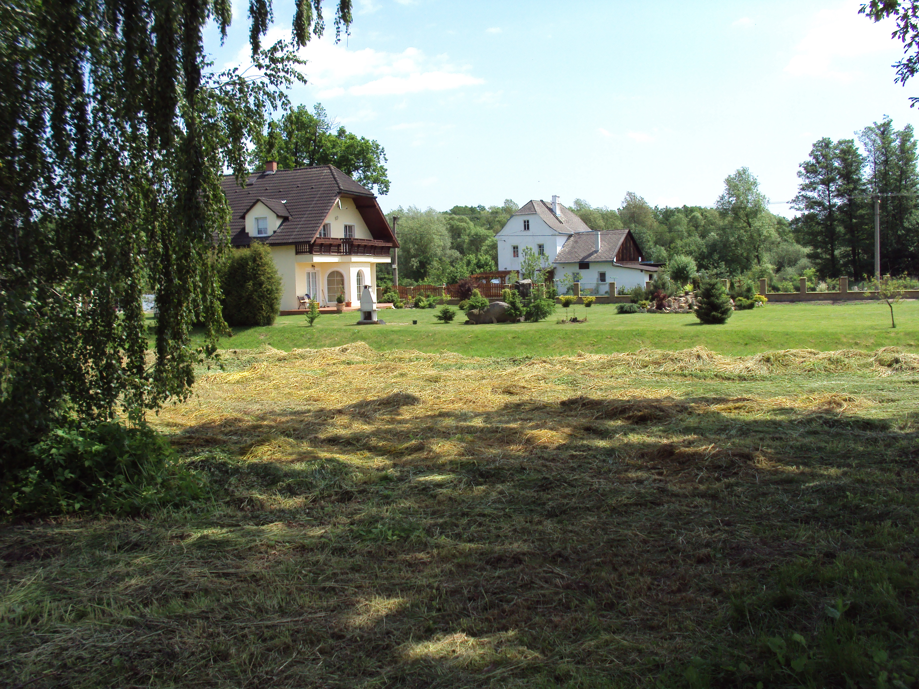 Novější domky uprostřed obce, levý břeh Svitávky